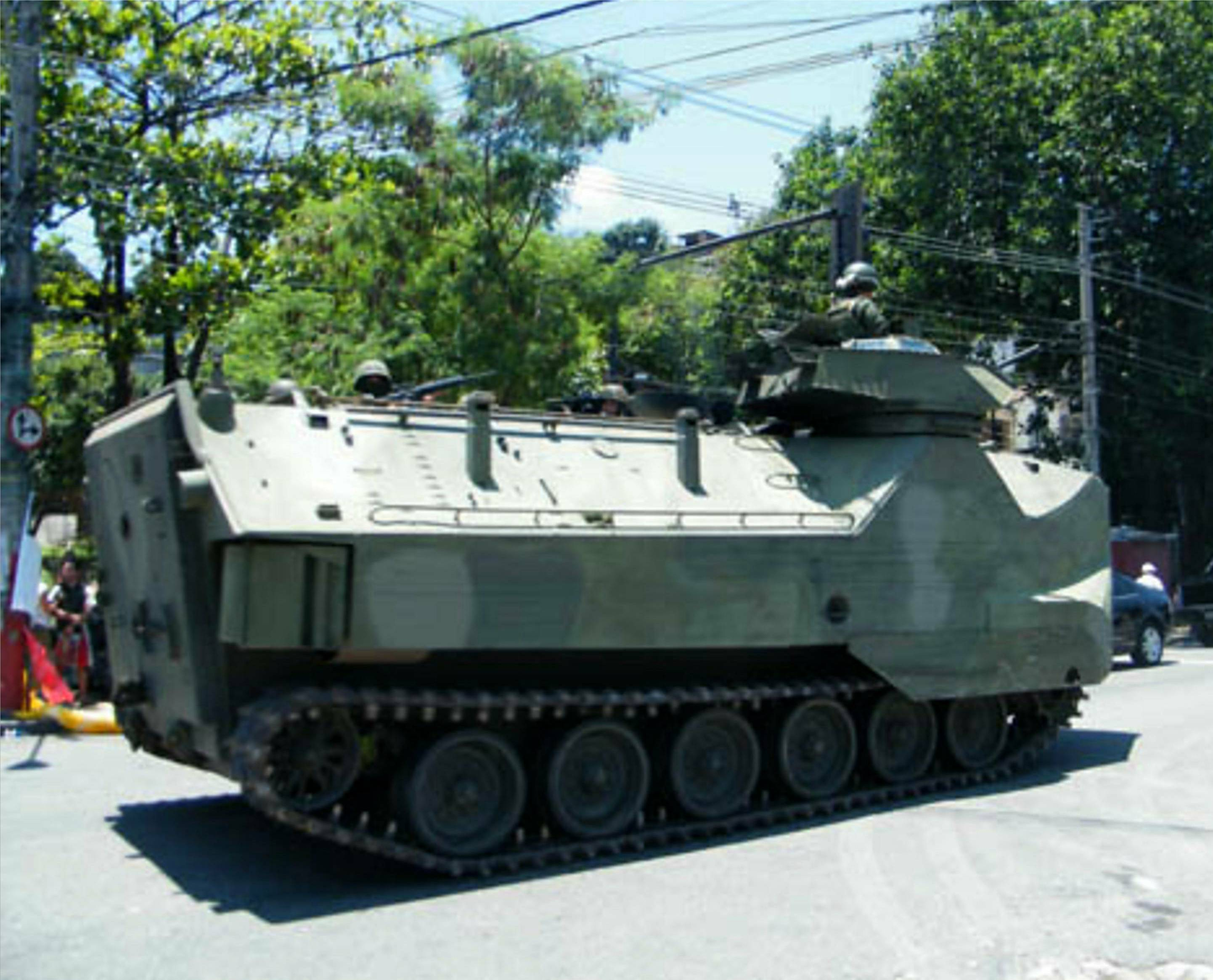 Rio de Janeiro - Veículo sobre Lagarta Anfíbio do Corpo de Fuzileiros Navais na ocupação do Complexo do Alemão ( Agência Brasil -ABr).